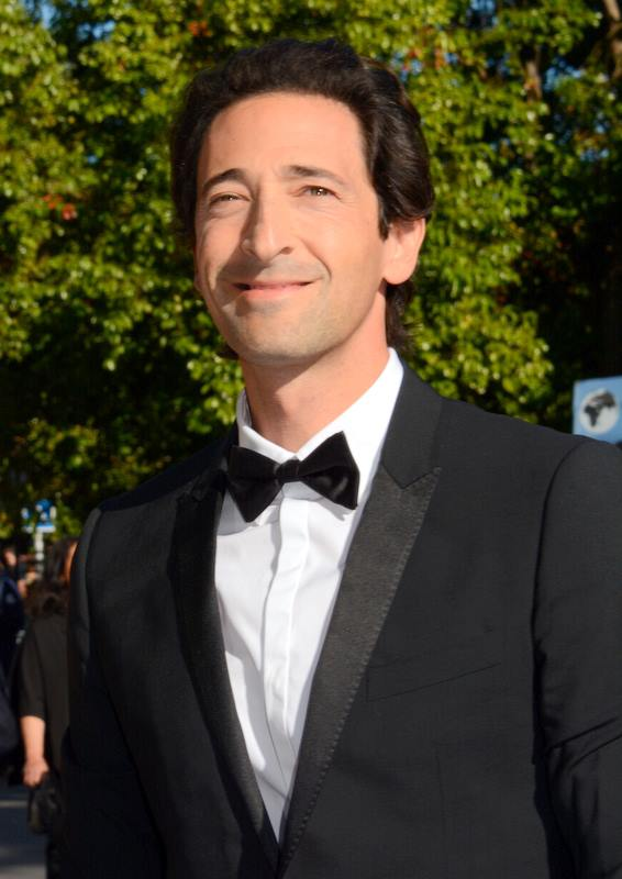 Adrien Brody au festival de Cannes